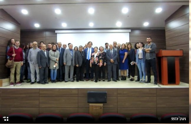 İkinci Türkiyə-Azərbaycan Coğrafiya Günlərində